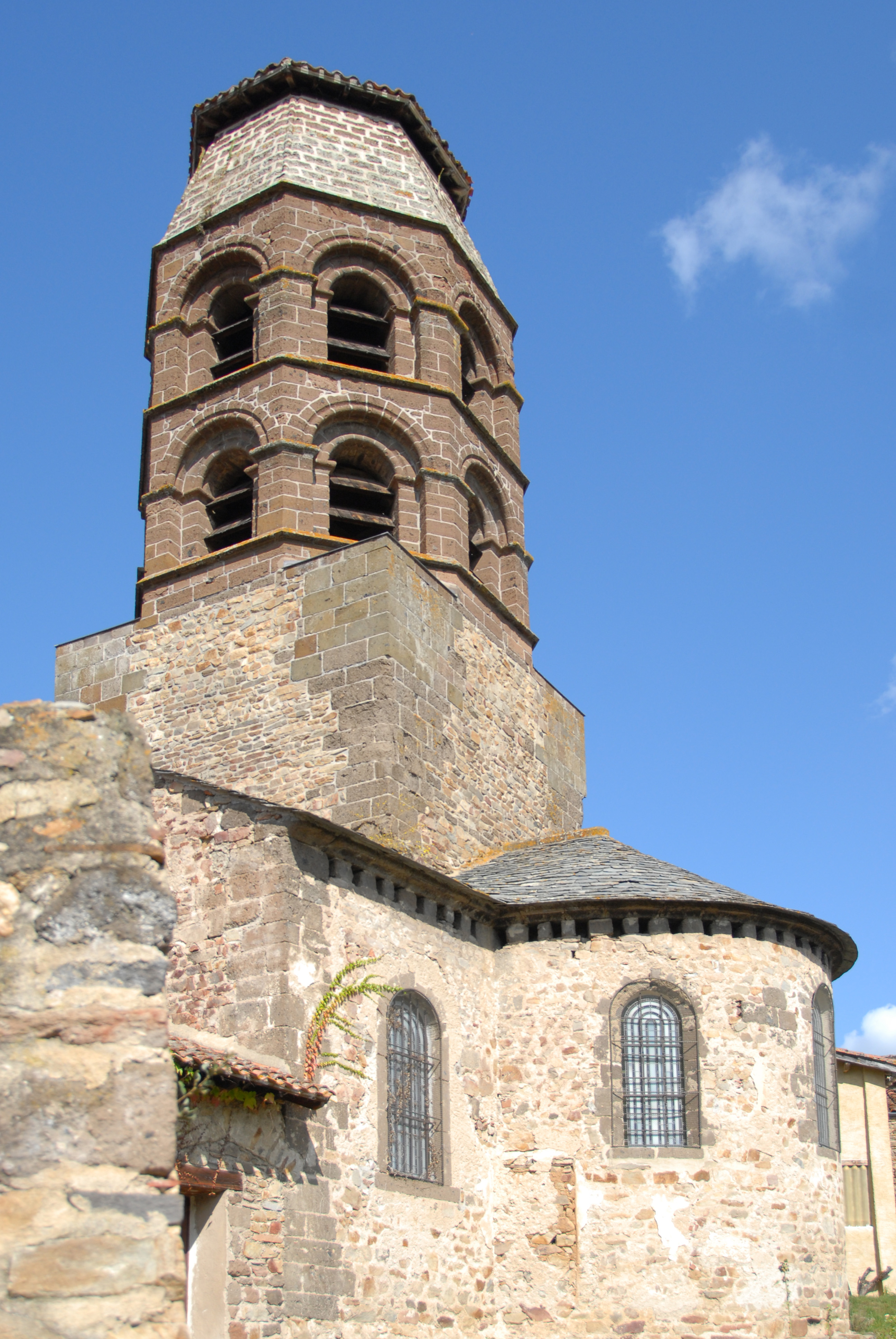 Abteikirche Saint-André Lavaudieu, Chorhaupt u. Vierungsturm v. SO